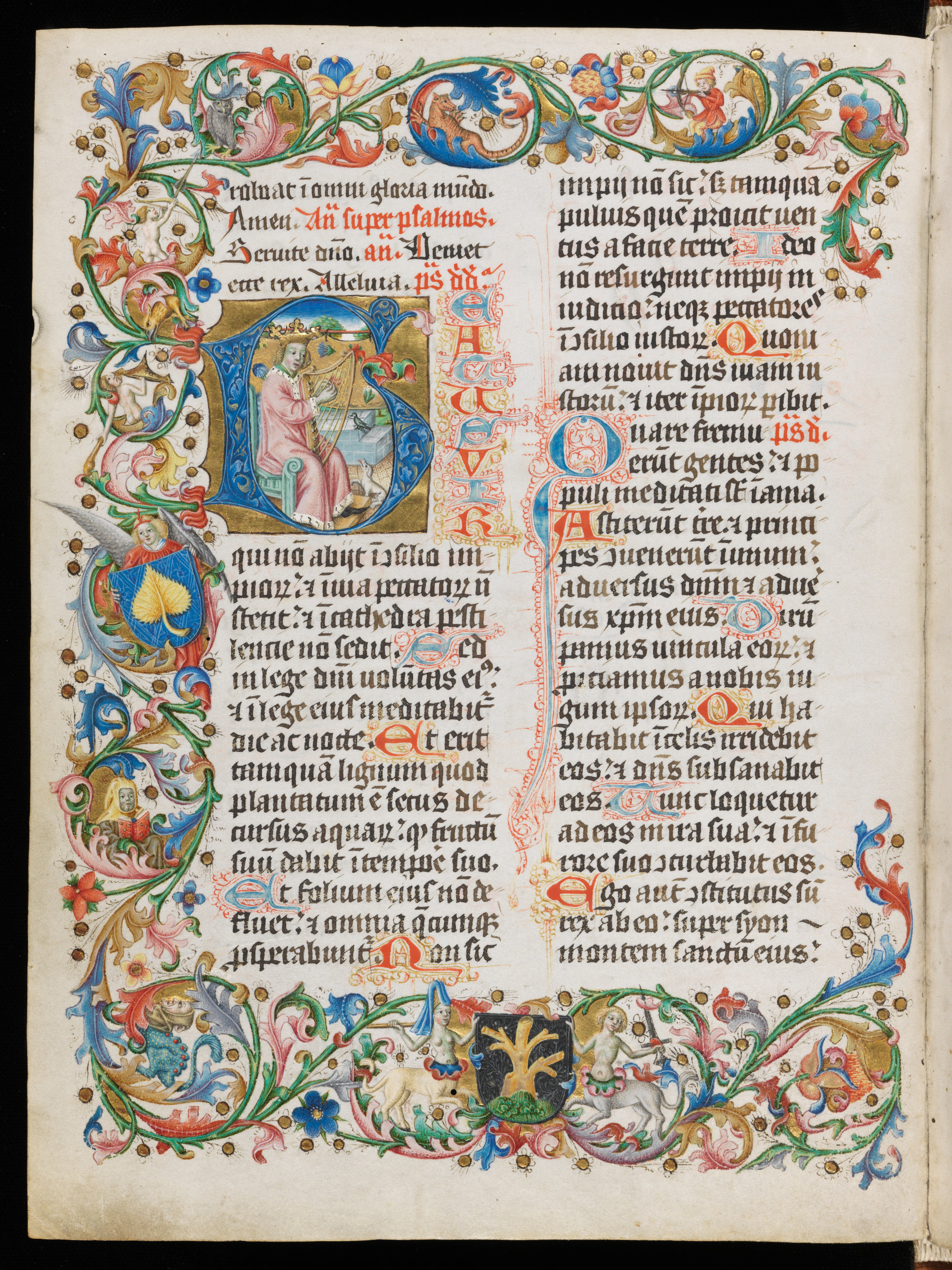 Schaffhausen, Stadtbibliothek, Ministerialbibliothek, Min. 98, f. 10v – Breviarium OFM (pars hiemalis). "Wohl über das Klarissenkloster Paradies nach Schaffhausen gekommen", Zitat aus